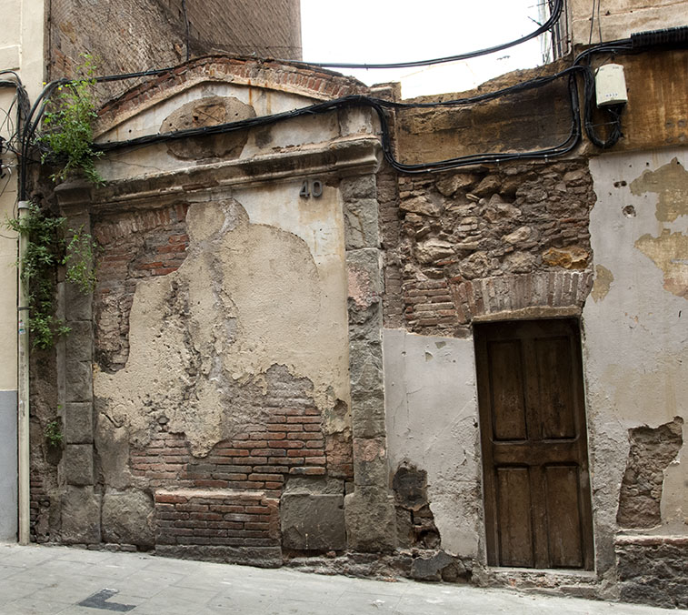 Façana de l'antiga capella del Sant Crist de Sants